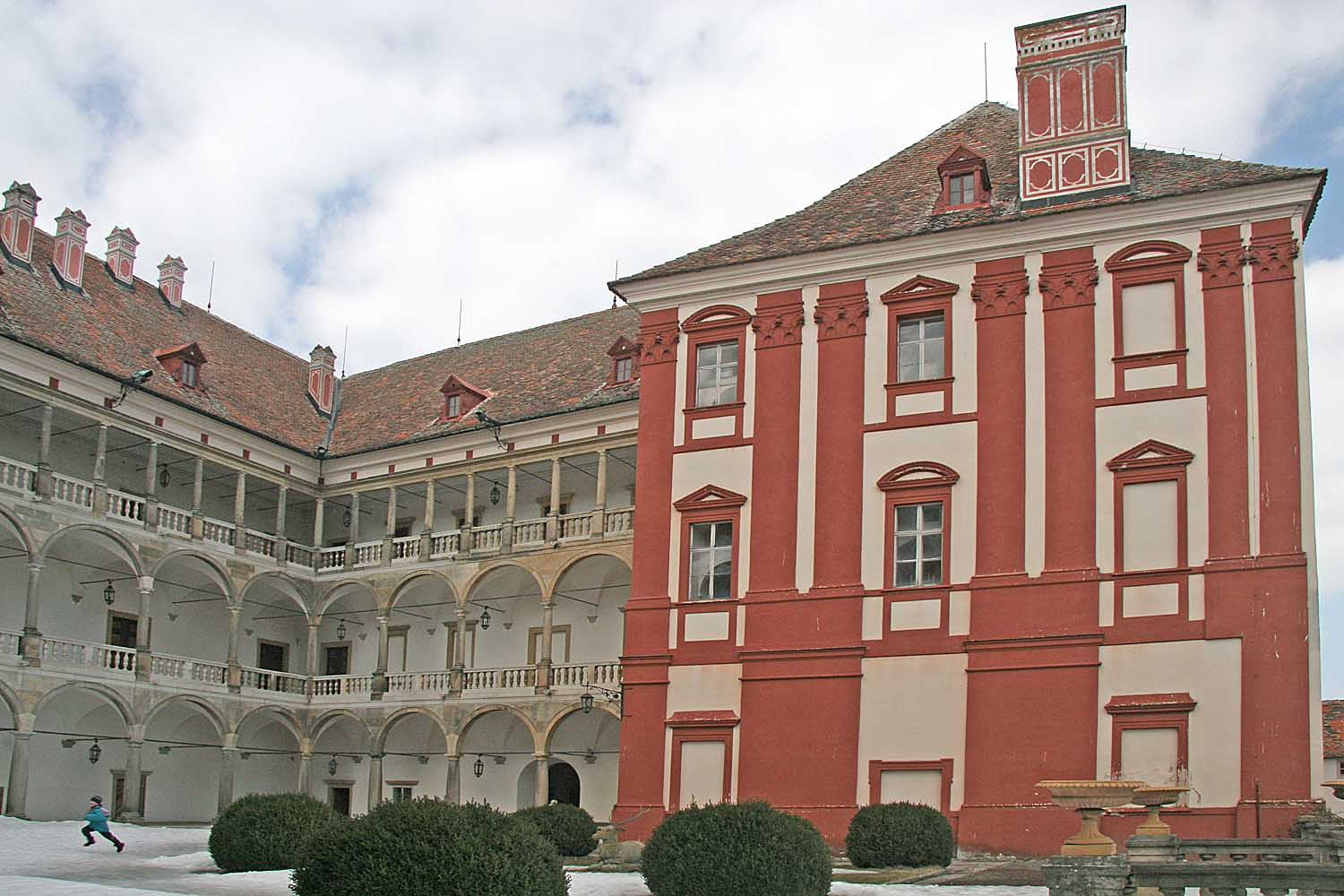 Opočno, zámecké nádvoří, district Hradec Králové, Czech Republic autor: Prazak date: 23. 3. 2006